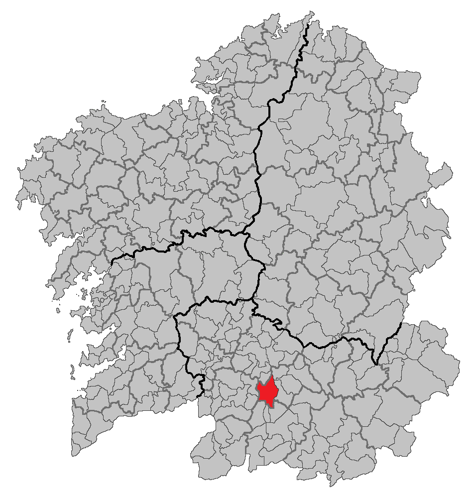 Mapa coa localización do concello de Allariz.